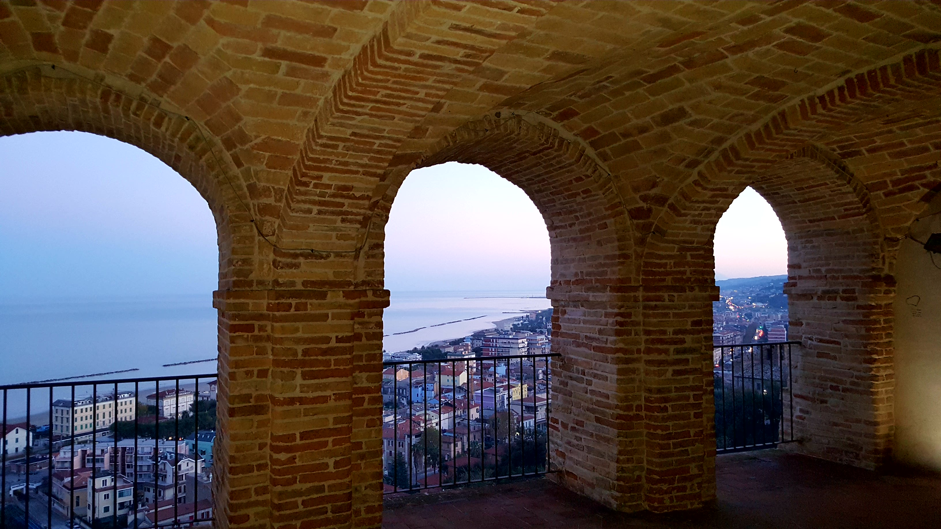 Vista panoramica di Grottammare, dalle logge di Piazza Peretti (Borgo Antico).